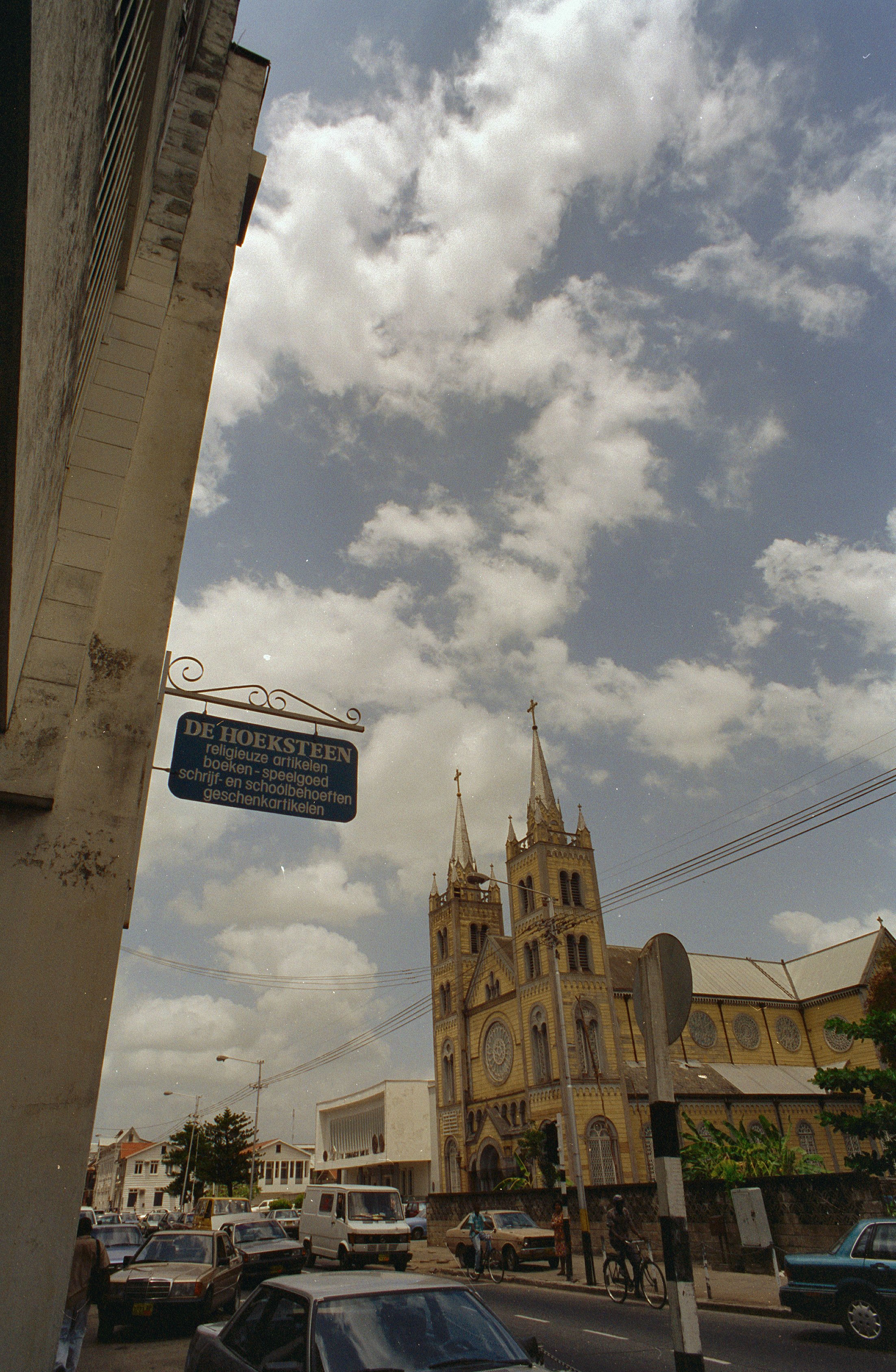 Sint-Petrus en Pauluskerk: Aanzicht op voorgevels en zijgevel met omgeving (opmerking: Suriname Reis Loek Tangel)